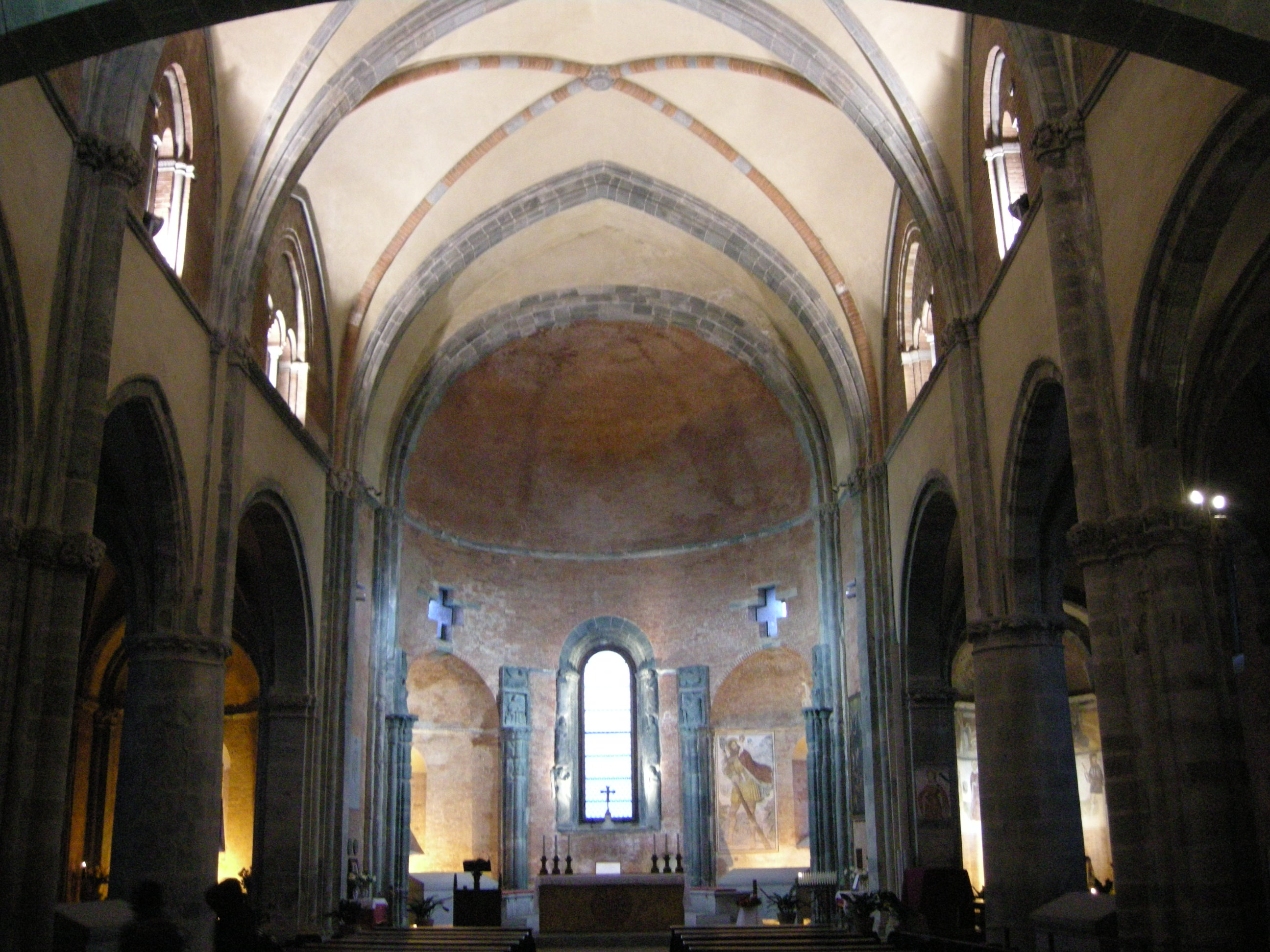 Sacra di san michele, chiesa abbaziale, interno